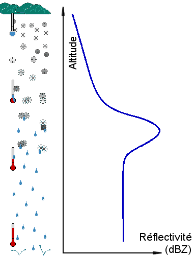 Diagramme montrant la réflectivité radar dans de la précipitation fondant en altitude. Le pic de retour est appelé la bande brillante et est dû à une simultanéité d'un large diamètre des flocons mouillés et de la constante diélectrique plus importante de l'eau sur ces flocons.